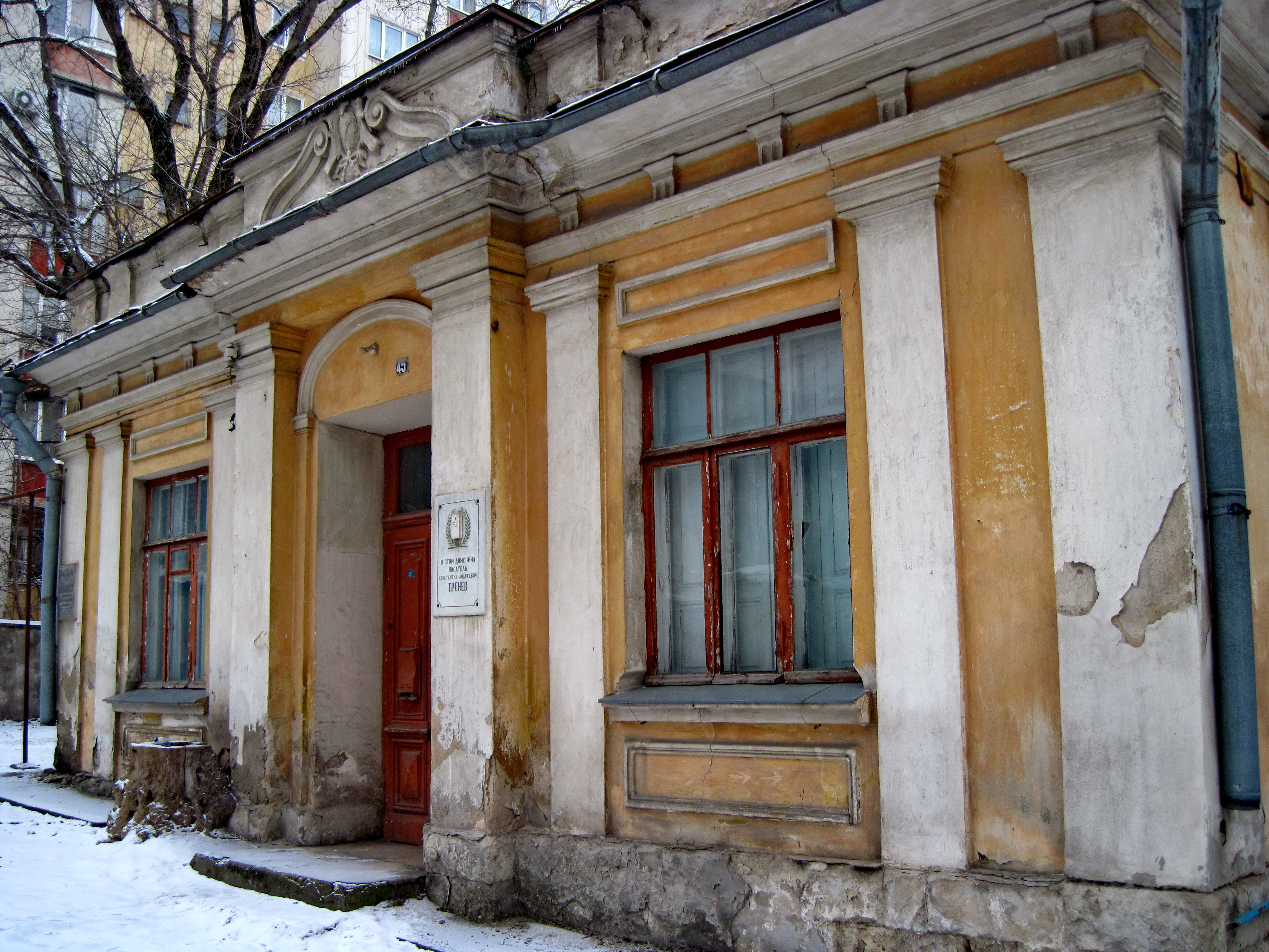 Дом: бульвар Франко, 45, Симферополь, Крым This object is located on the Crimean Peninsula and recognized as cultural heritage by Russia under the monument ID: 8231213000. The legal status of the Crimean region is currently disputed.